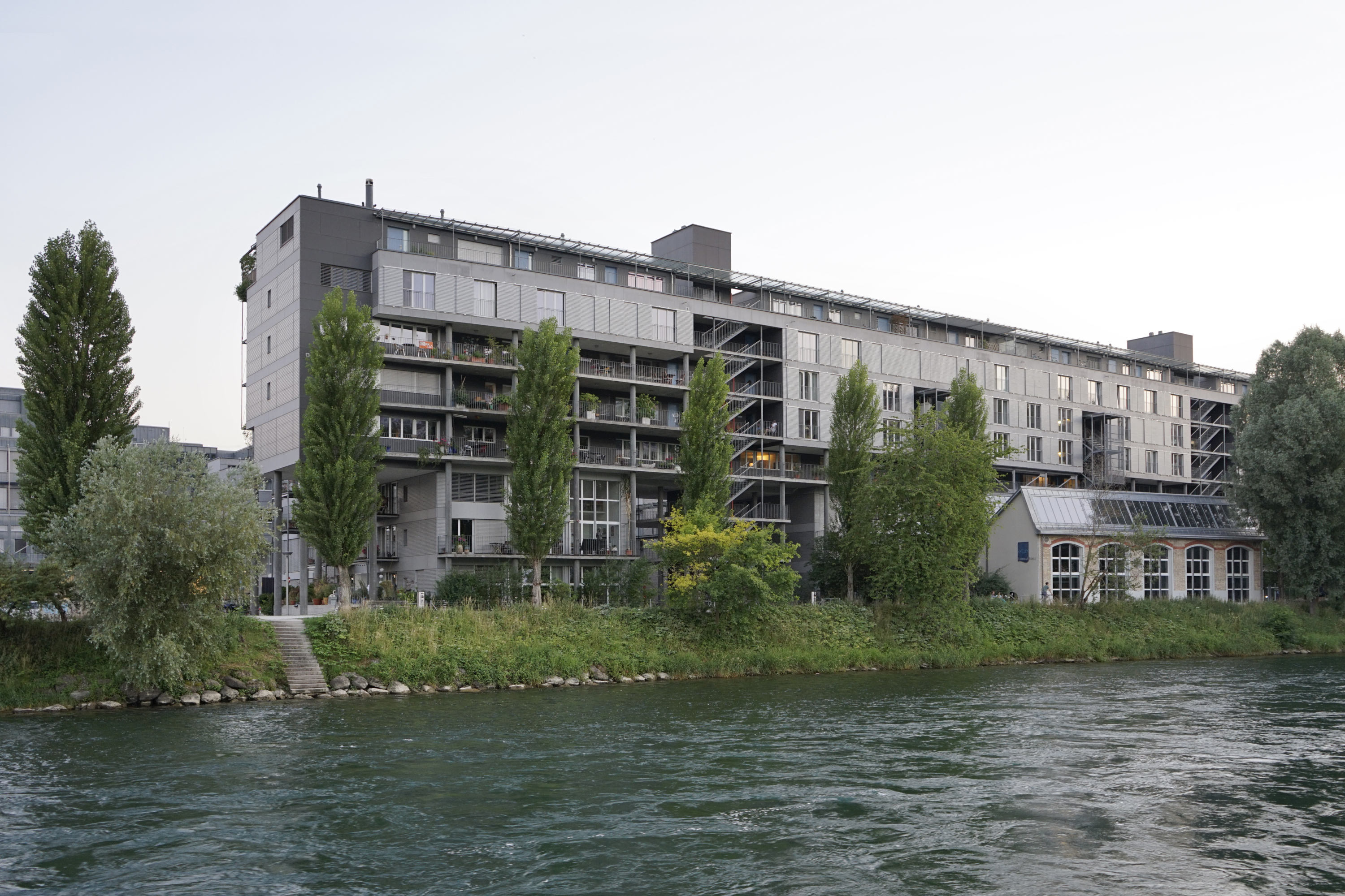 Überbauung Limmatwest, Kuhn Fischer Partner, 1990-2002